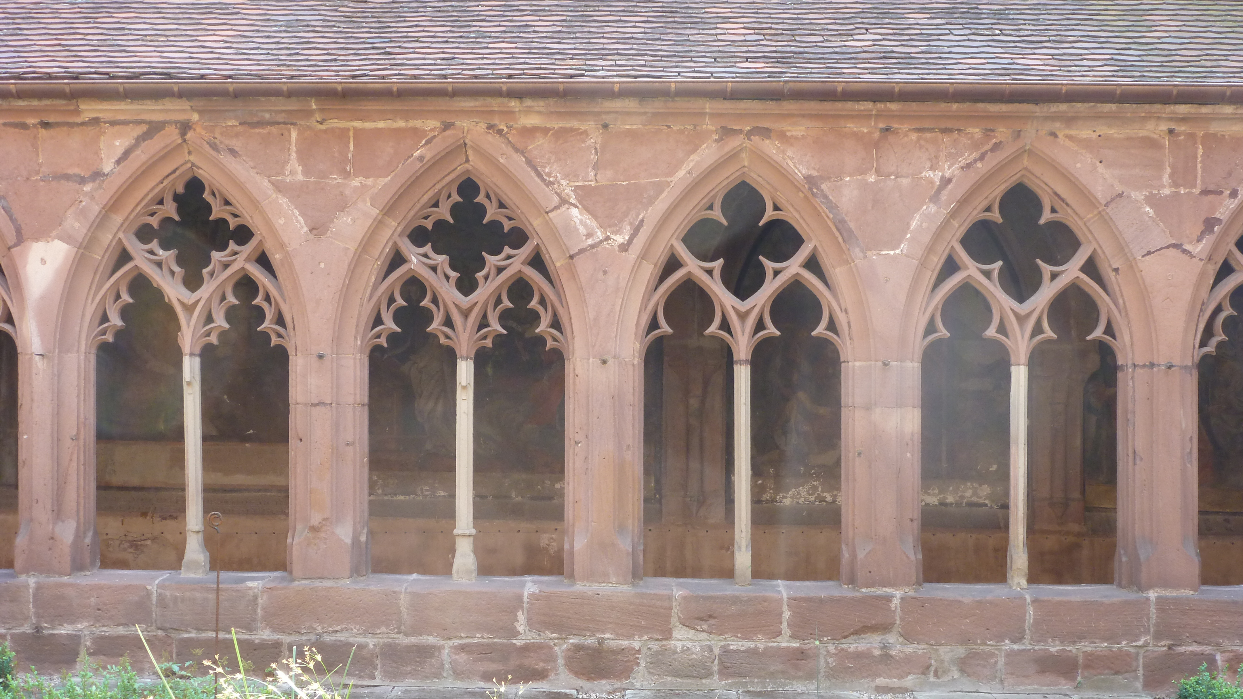 Cloître de l’ancien couvent des récollets à Saverne (Bas-Rhin, Alsace, France).